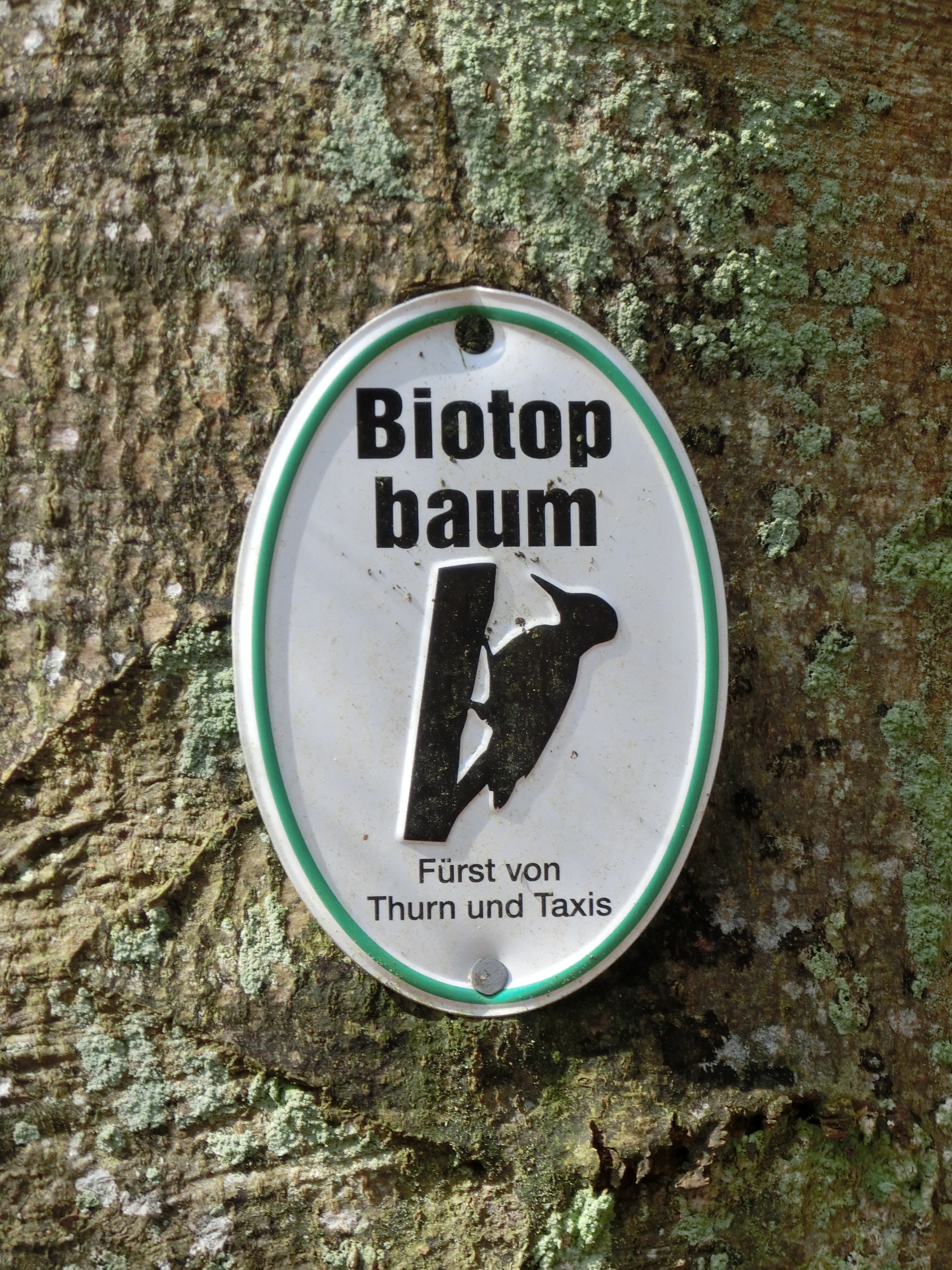 Deutschland - Baden-Württemberg - Landkreis Sigmaringen - Pfullendorf, Ortsteil Motschieß: Kennzeichnung eines Biotopbaums durch "Fürst von Thurn und Taxis"